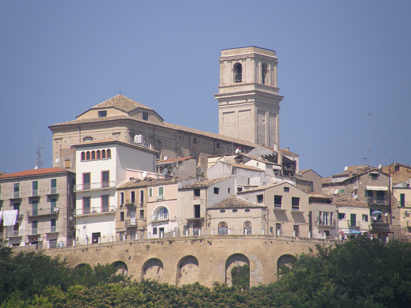 Vasto